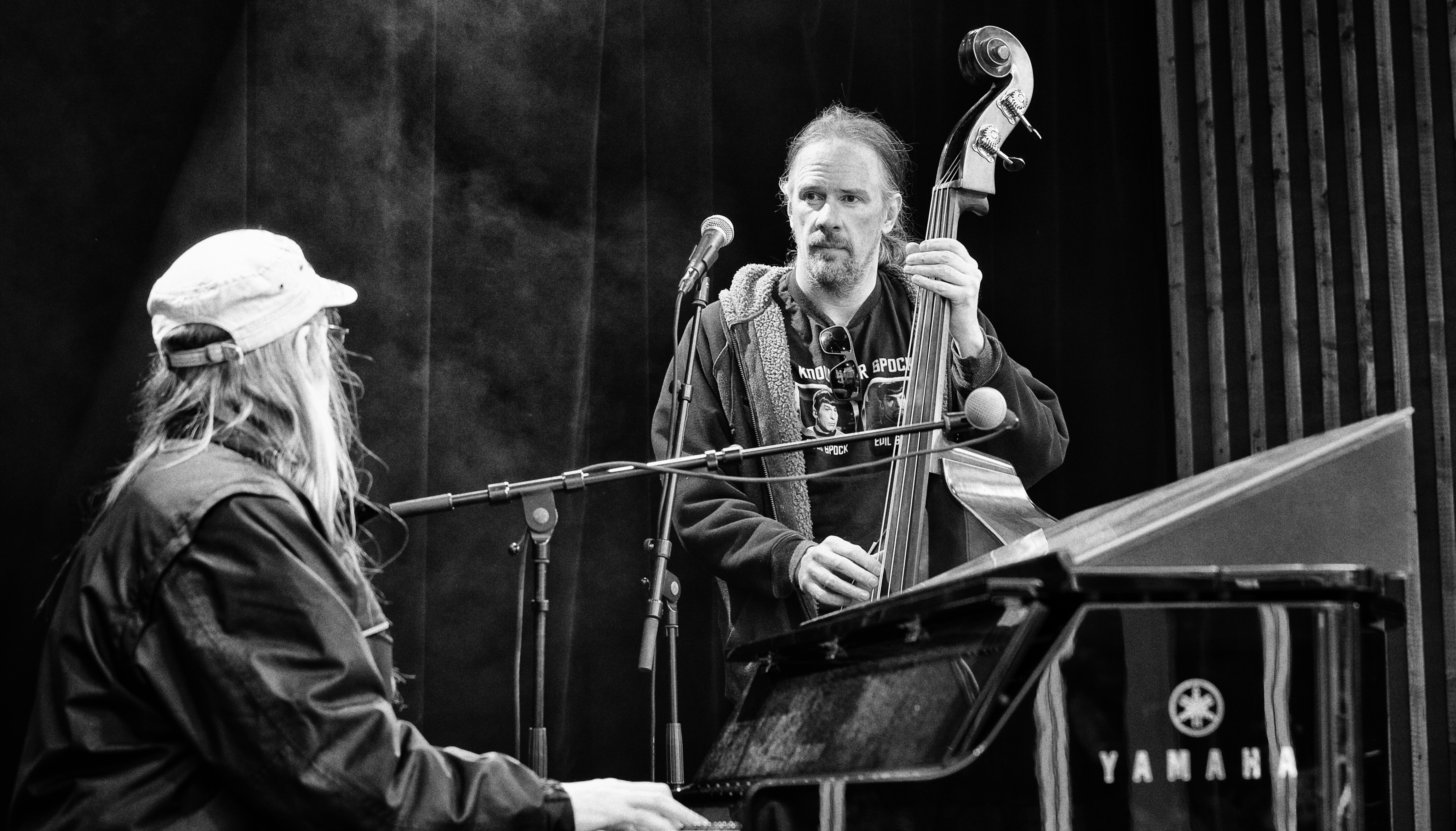 The Johansson brothers playing jazz at Liseberg's fairground.